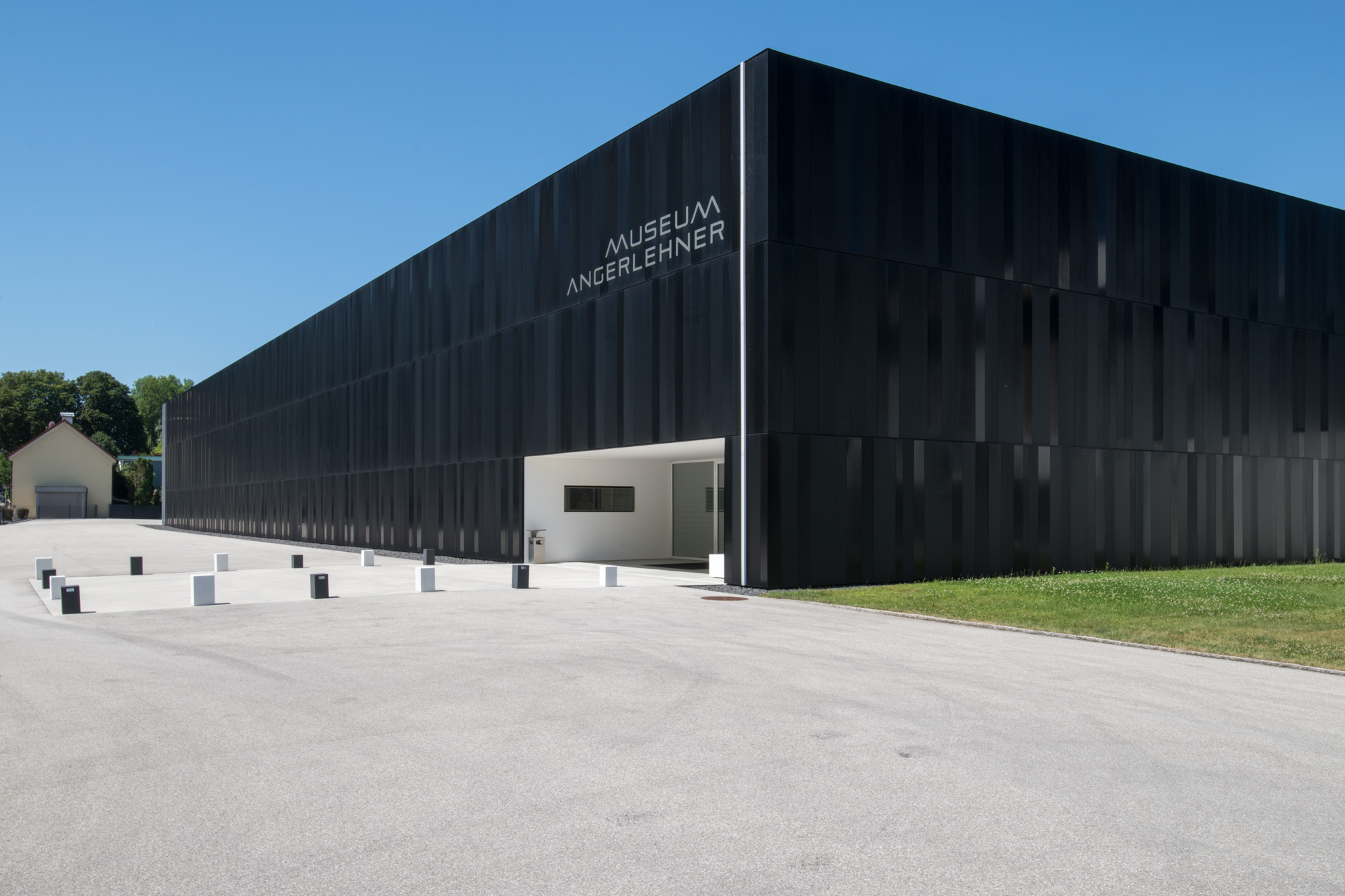 Museum Angerlehner in Wels / Oberösterreich